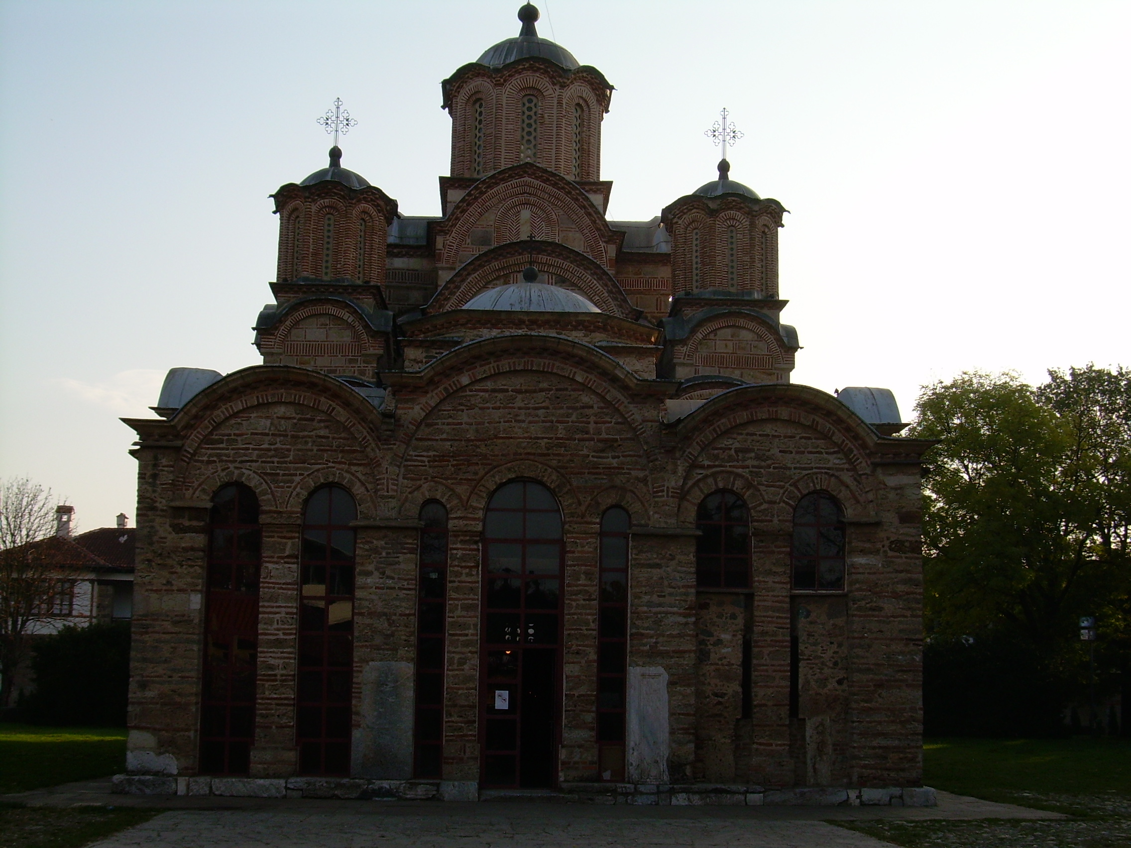 Manastir Gračanica